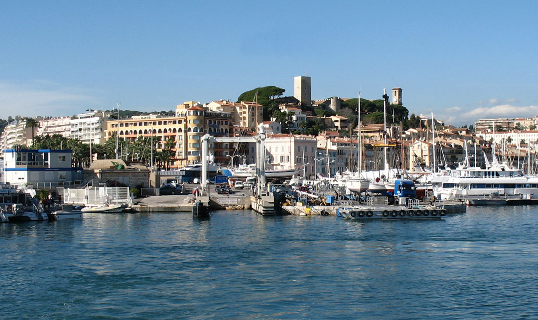 Cannes, quartier Le Suquet, France